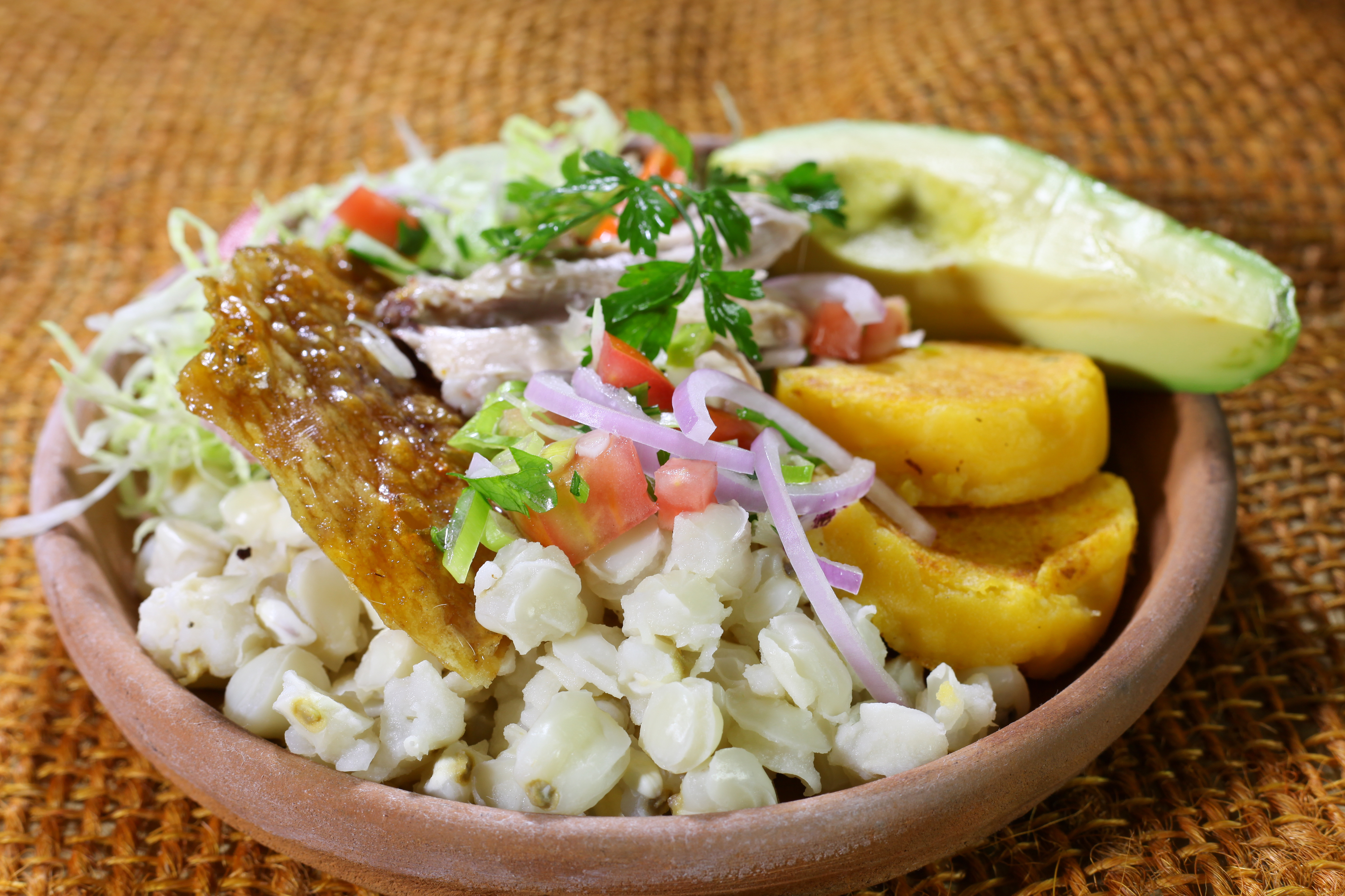 Imbabura Hornado (23)